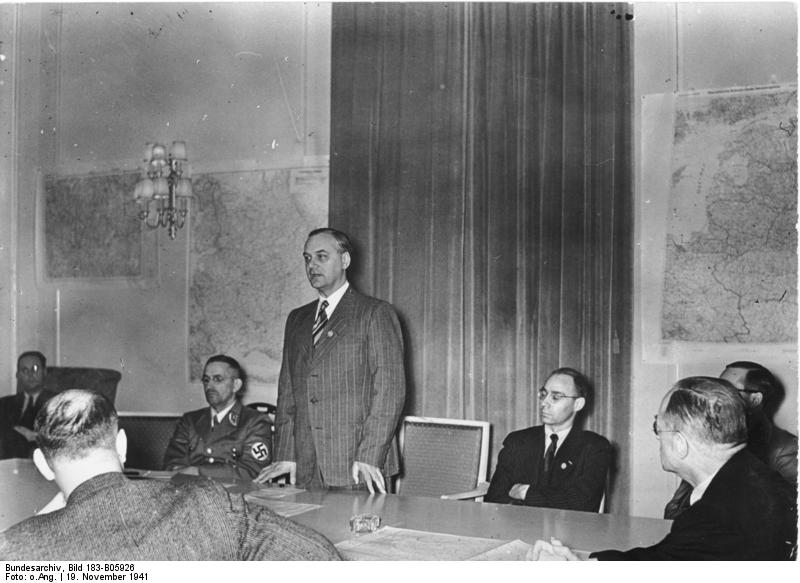 ADN-ZB/Archiv Im faschistischen Deutschland: Reichminister Rosenberg während einer Pressekonferenz anläßlich seiner Ernennung zum Beauftragten der Zivilverwaltung in den von den Faschisten besetzten sogenannten Ostgebieten. Rosenberg stehend, links von ihm Gauleiter Alfred Meyer, sein ständiger Stellvertreter; rechts neben R. Hauptschriftleiter Weiss, Leiter des Verbandes der deutschen Presse. 19.11.1941